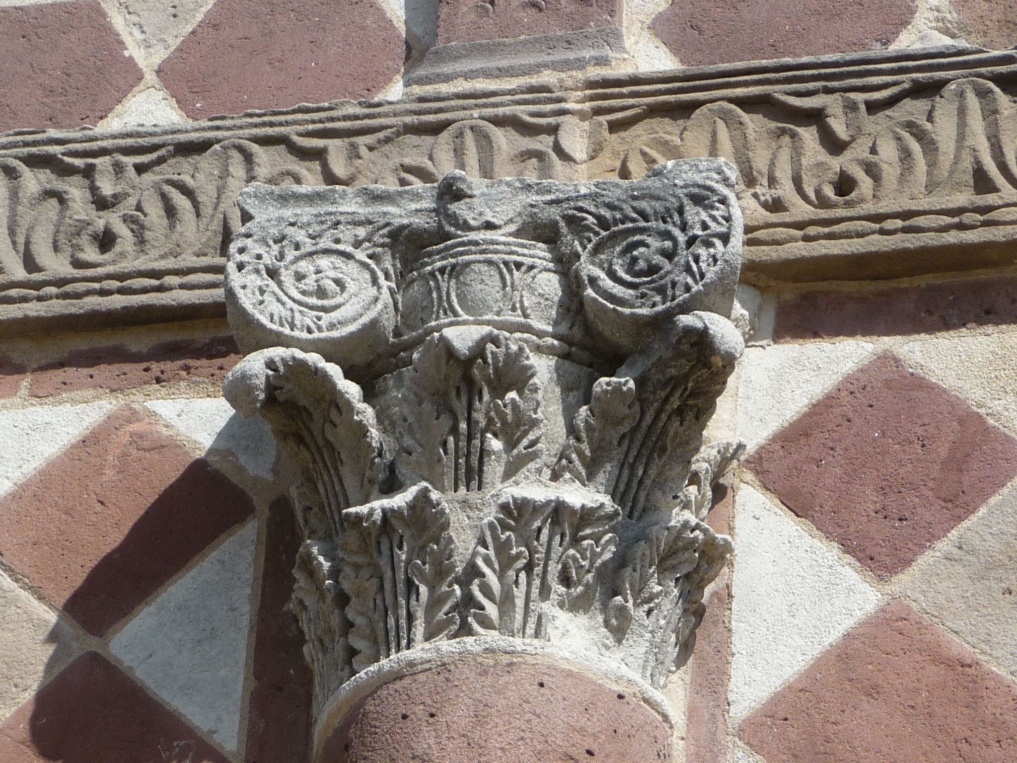 Torhalle Lorsch